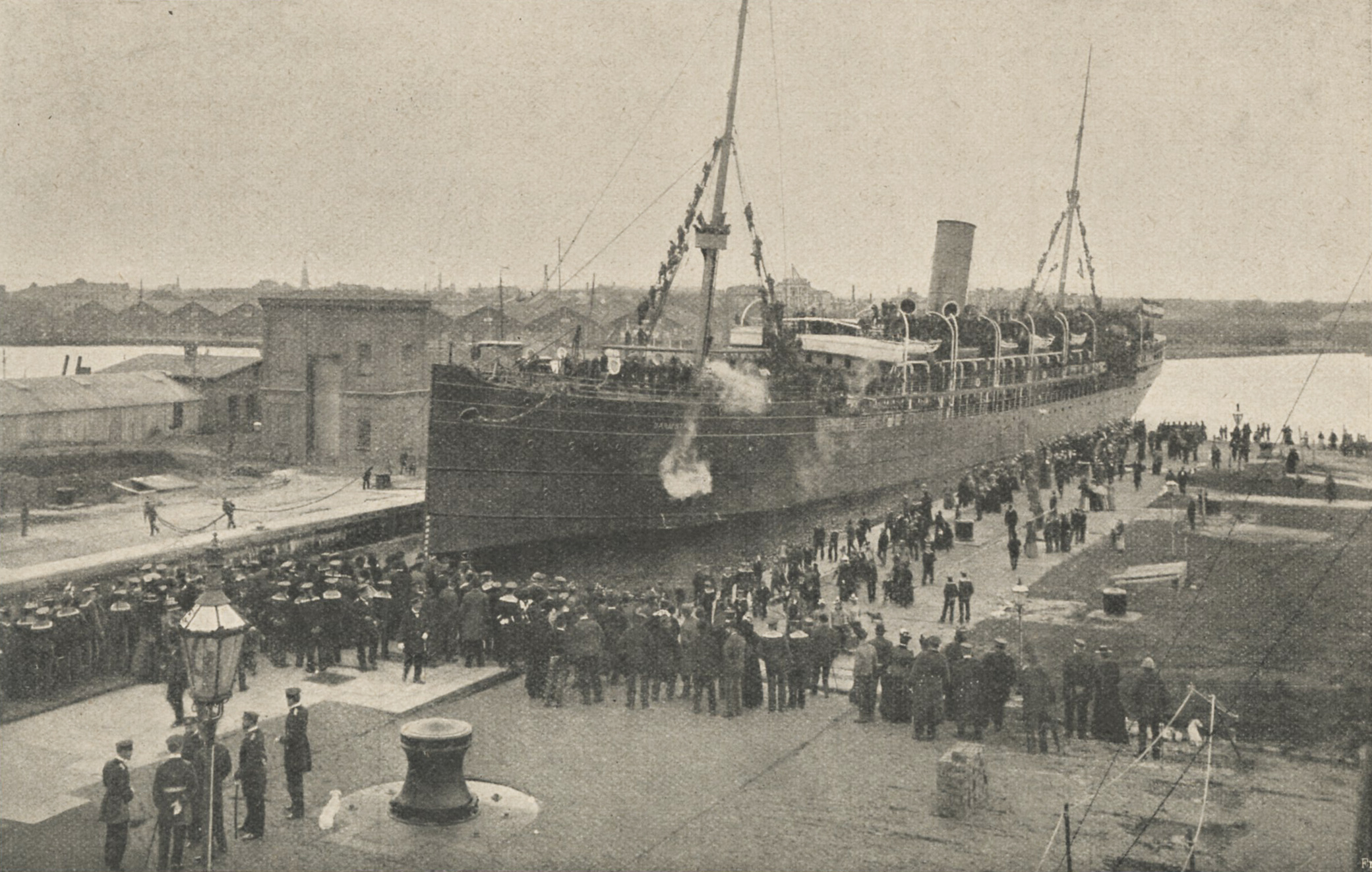 Original-Bildunterschrift: Die Abfahrt des Marine-Expeditionskorps für Deutsch-Südwestafrika auf dem Dampfer „Darmstadt“ von Wilhelmshaven. Nach einer Aufnahme von Hofphotograph Fr. Kloppmann in Wilhelmshaven.